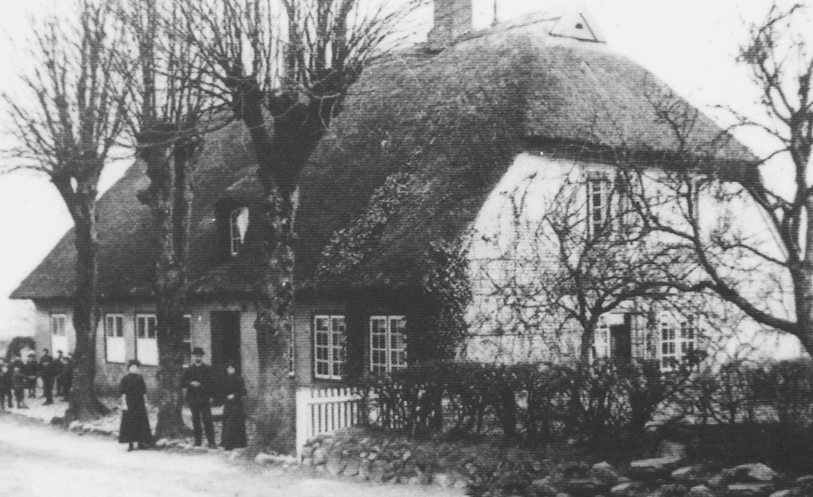 Die alte Schule in Döhnsdorf, erbaut 1830, als Schule geschlossen 1968, heute Privathaus.